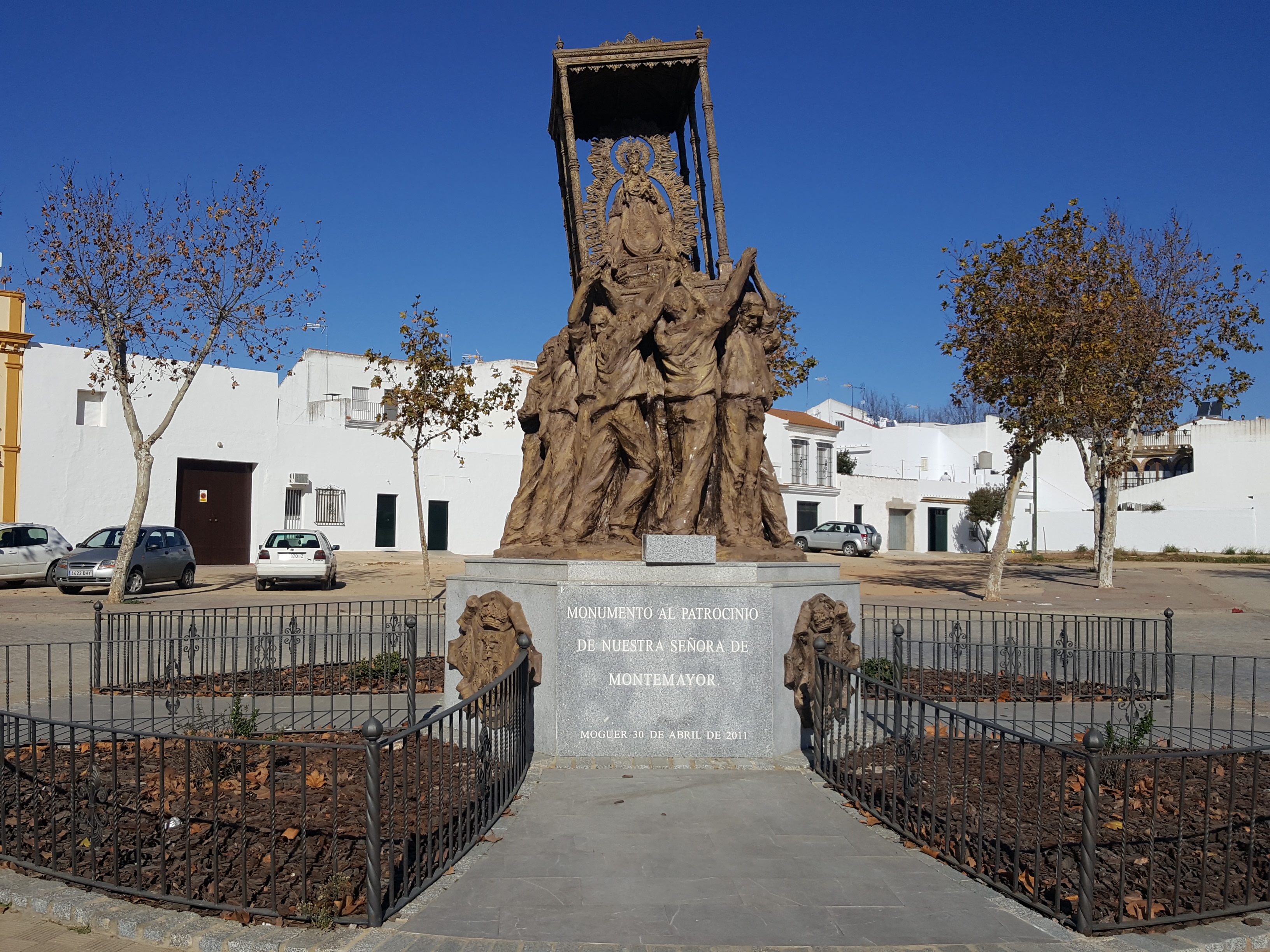 Monumento patrocinio de la Virgen de Montemayor en Moguer Andalucía (España).